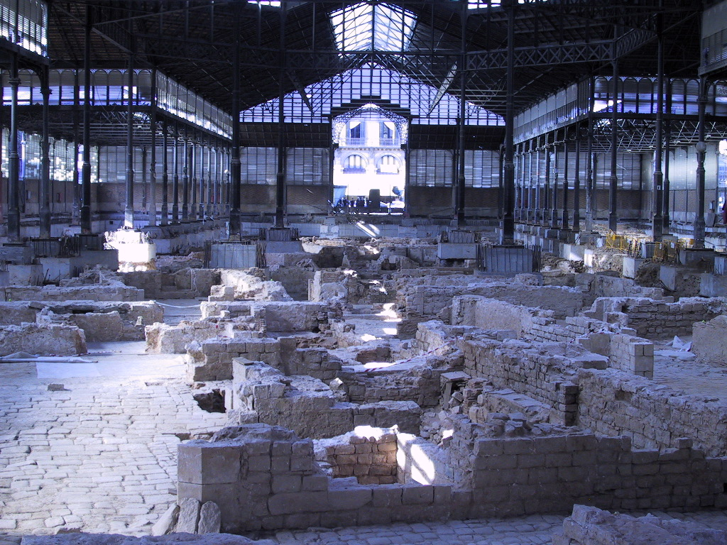 Interior del Born, columnes, i detall de les excavacions de les restes de la ciutat prèvia a 1714